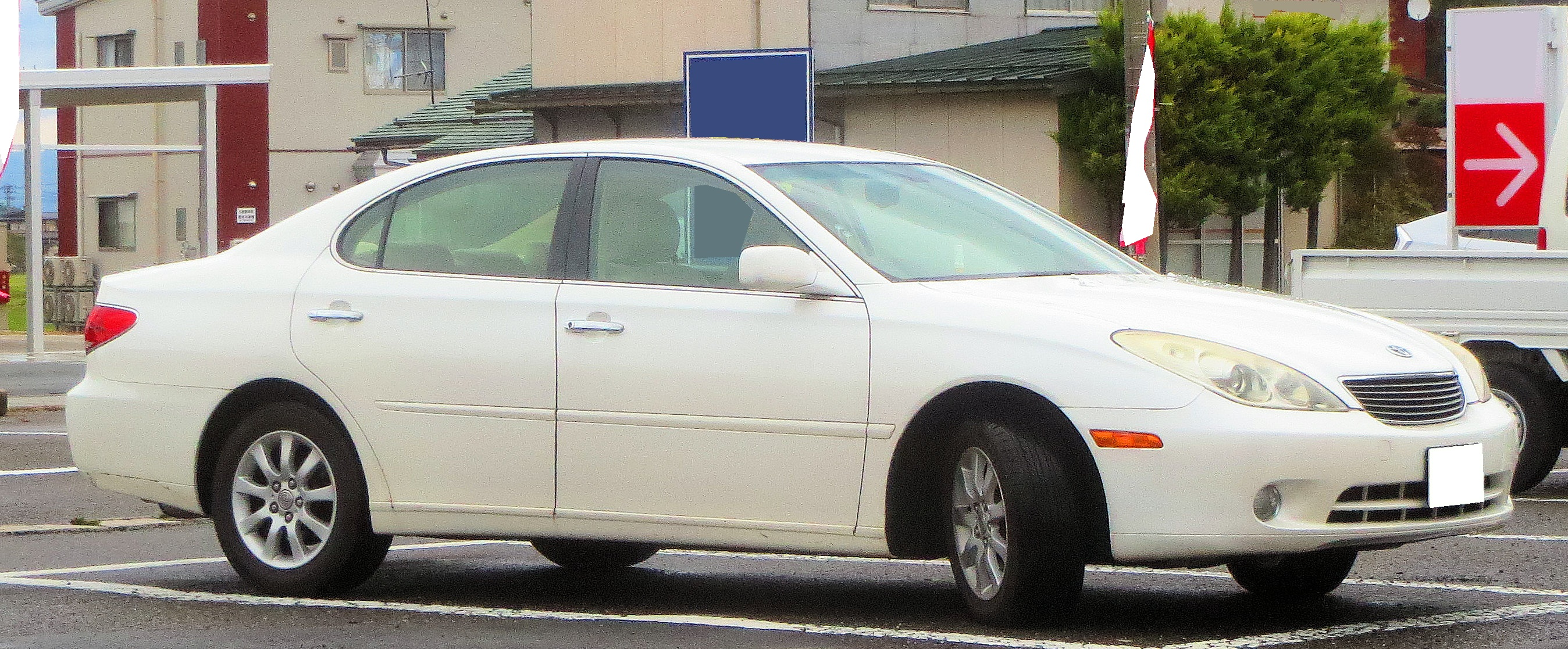 3代目 トヨタウインダム 3.0G 後期型